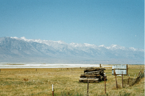 Sierra Nevada, versant oriental, près de Lone Pine, Californie